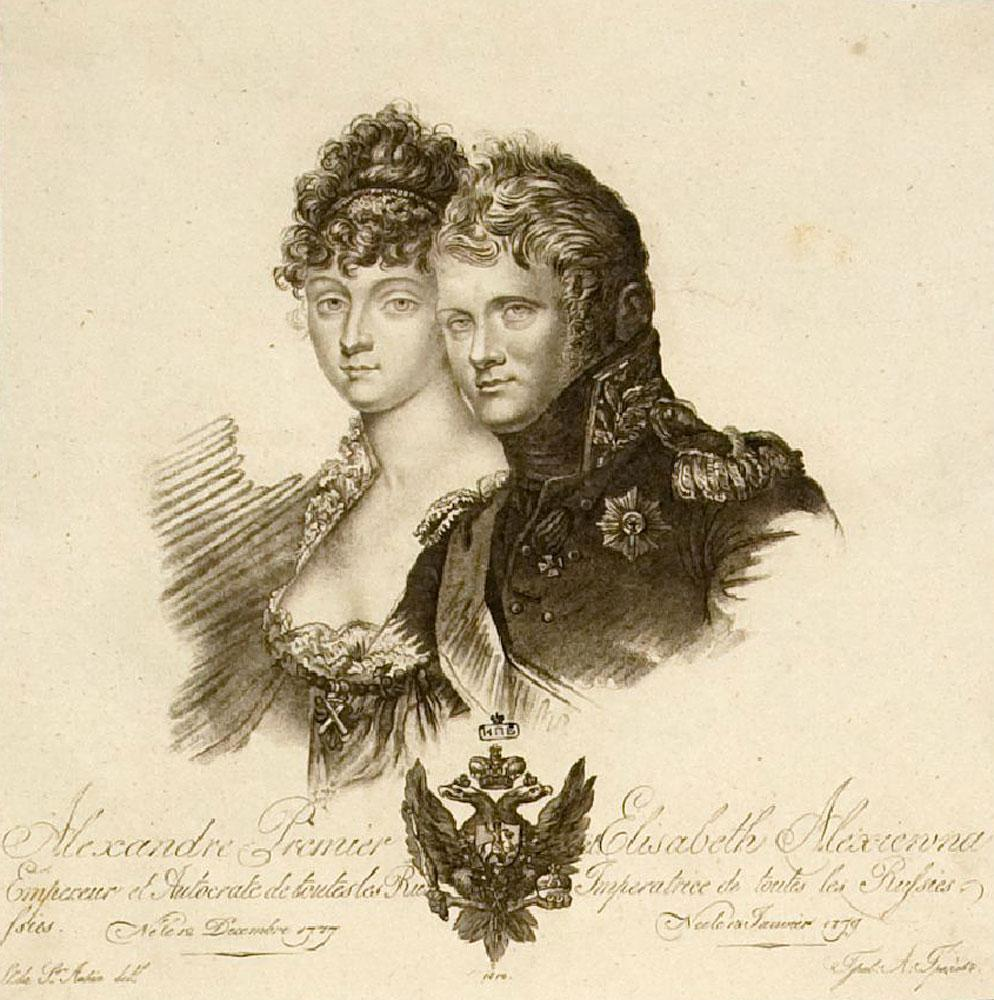 Грачев, А.П. Император Александр I и императрица Елизавета Алексеевна: [Эстамп]. - 1812. - 1 л.: Гравюра пунктиром, резцом.